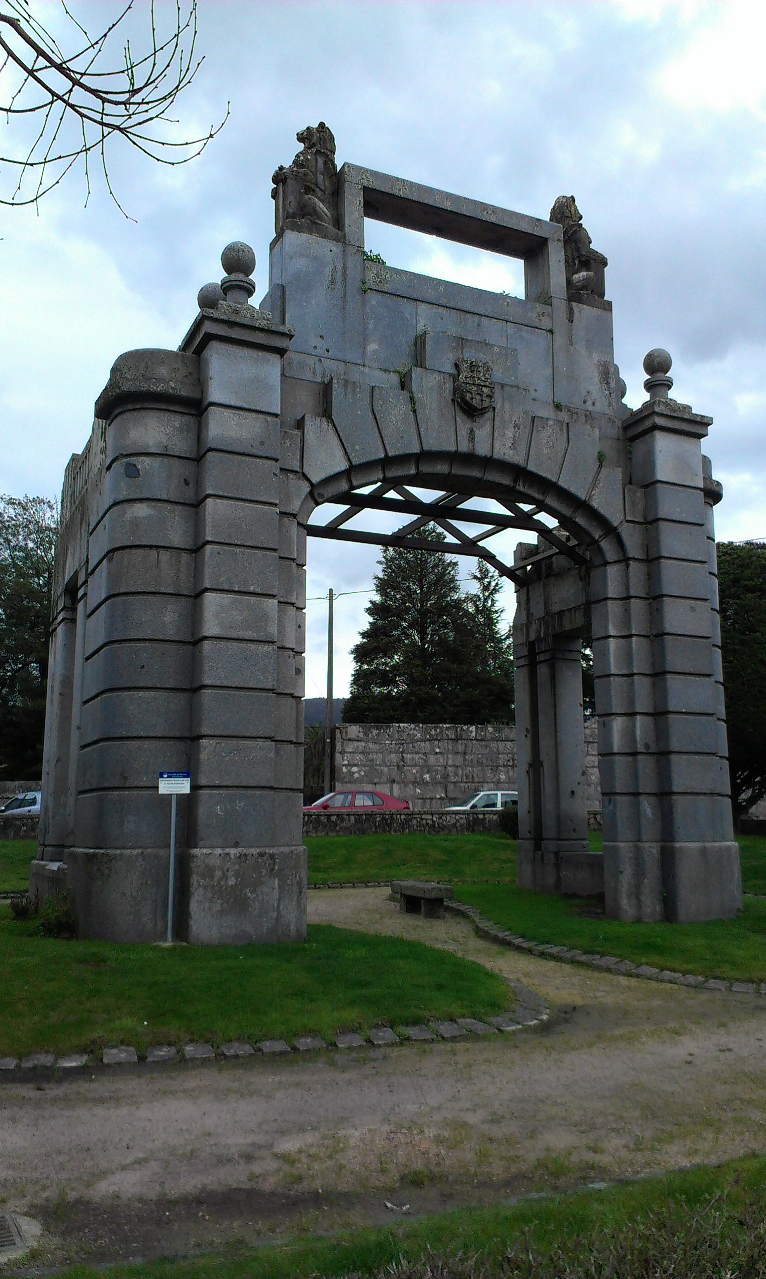 Templete da Rede de San Luís de Madrid, doada ao concello do Porriño, agora no parque Campo da Feira desa vila pontevedresa.